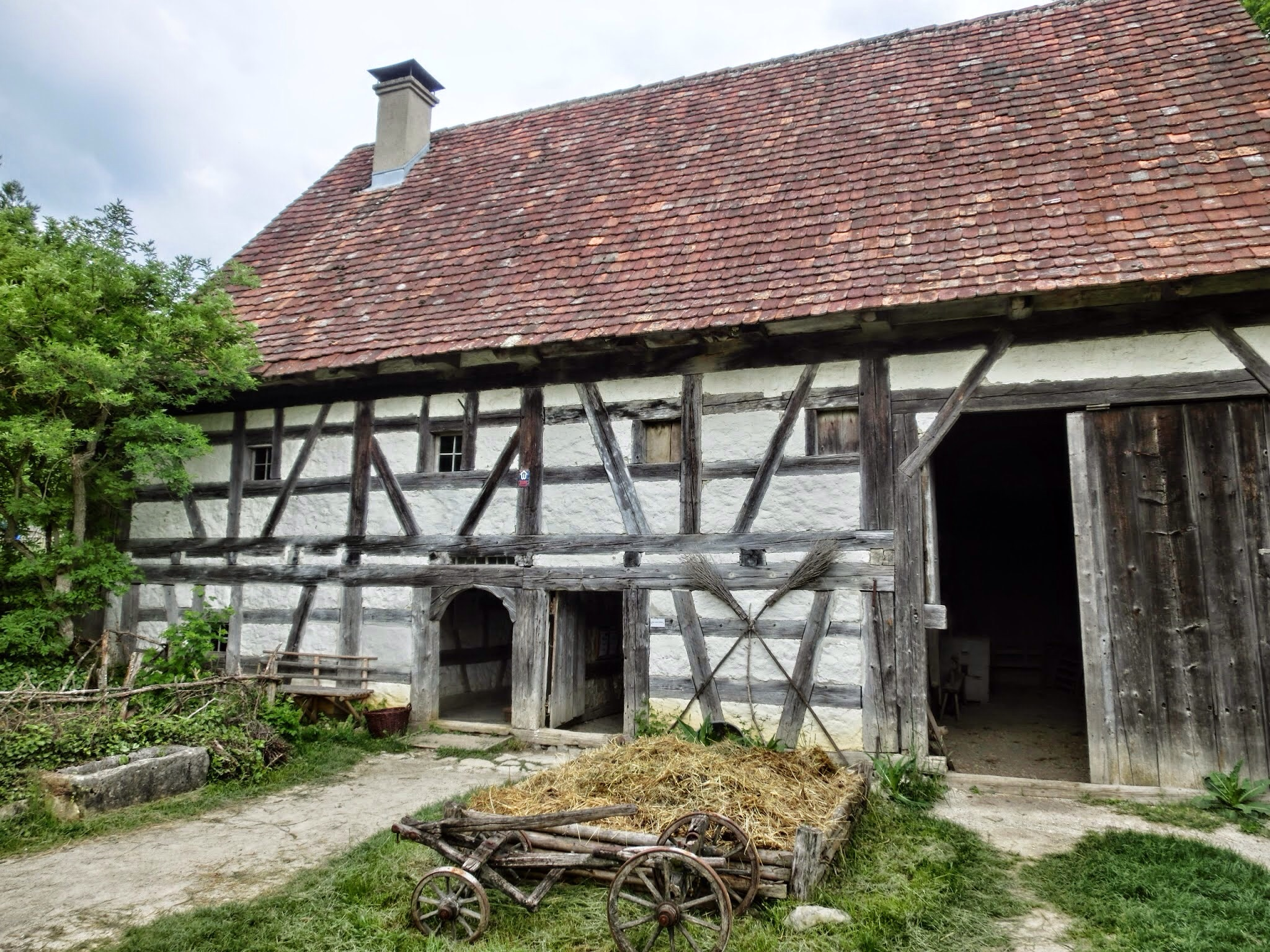 Deutschland - Baden-Württemberg - Landkreis Tuttlingen - Neuhausen ob Eck: Freilichtmuseum, Weber- und Kleinbauernhaus Dautmergen